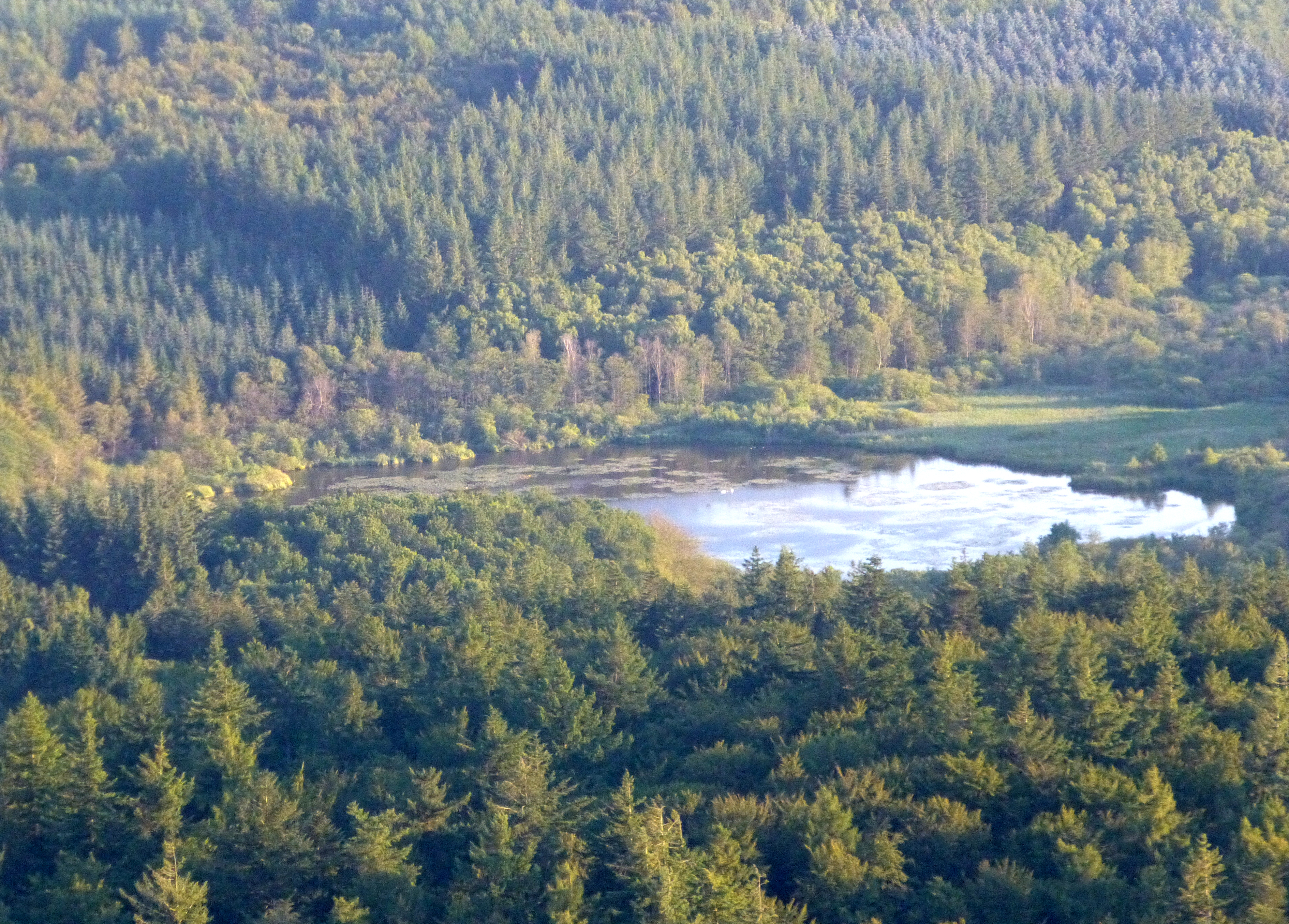 Tranevig set fra nord